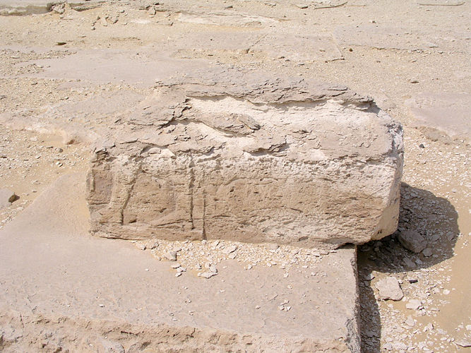 fragments du temple funéraire de la pyramide de Sésostris Ier à Licht